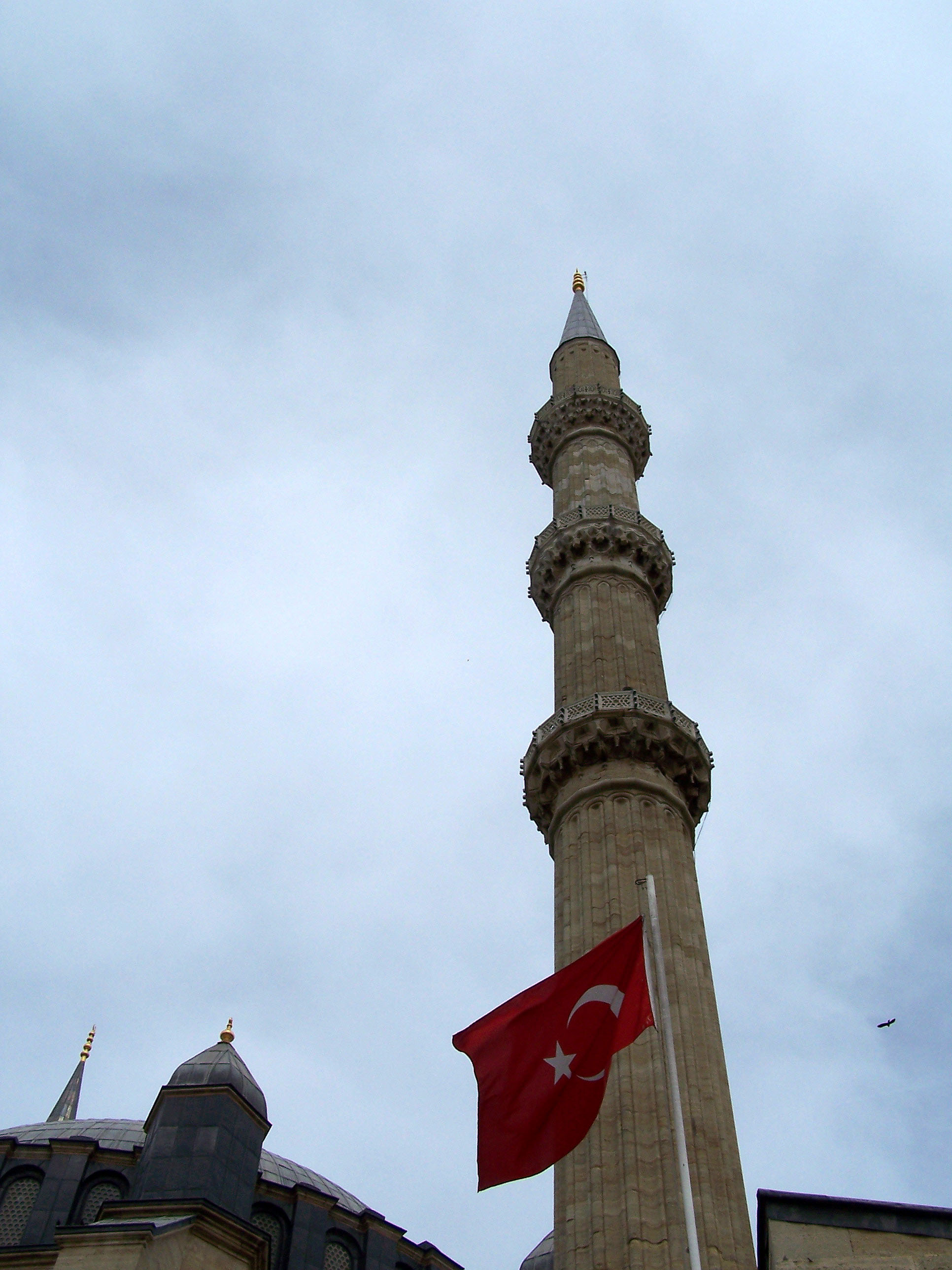 Minaret of Selimiye Camii in Edirne, Turkey